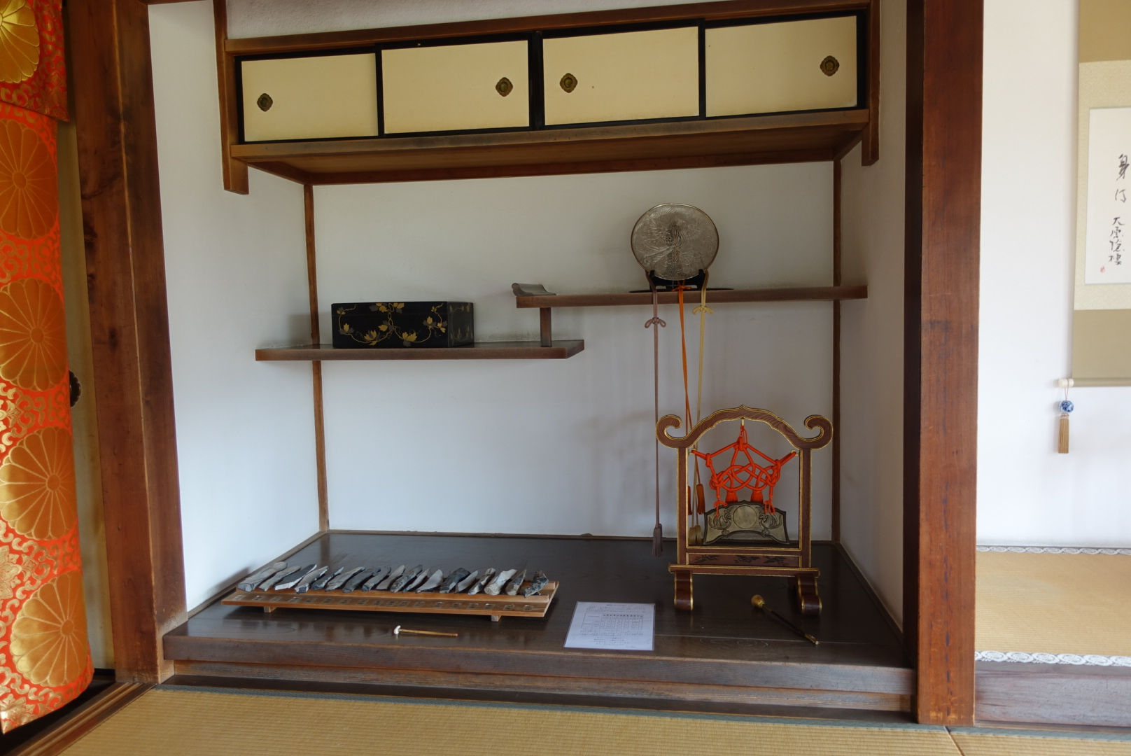 京都大原にある実光院の床の間